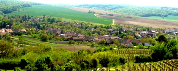 morkuvky pohled na obec ze severovychodu